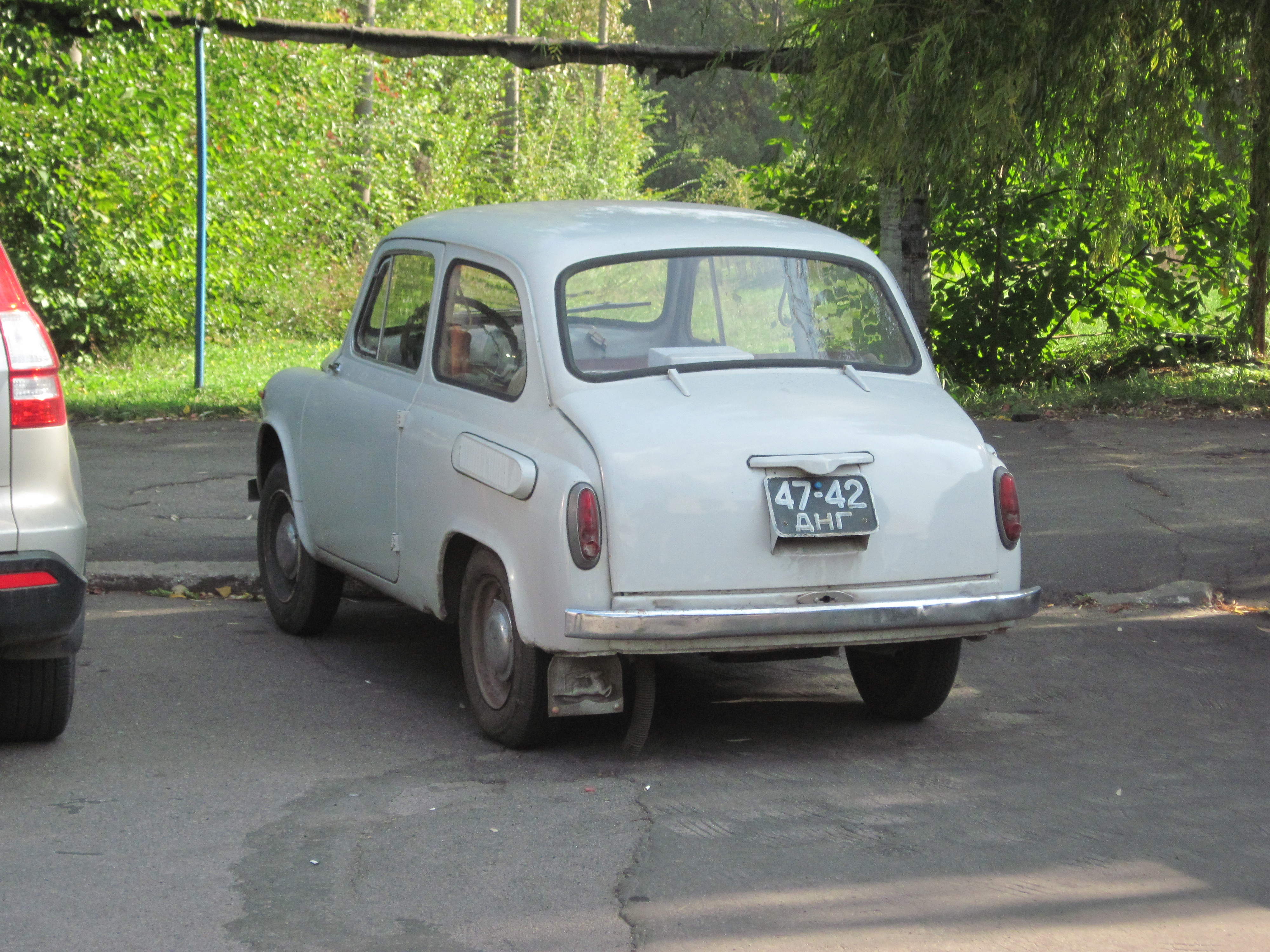 ЗАЗ-965А